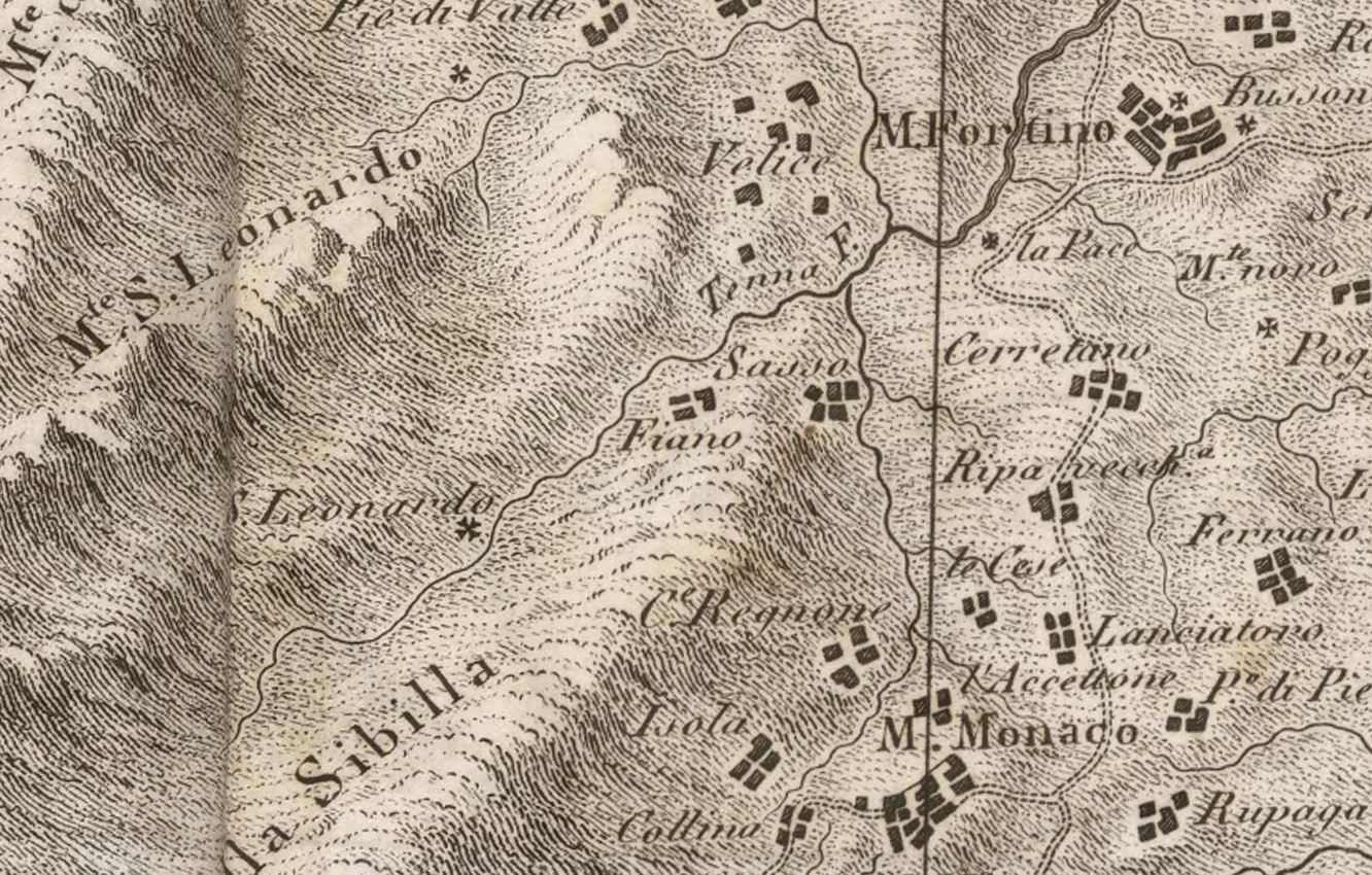 Rubbiano (Montefortino) in una mappa ottocentesca, riportato come Fiano